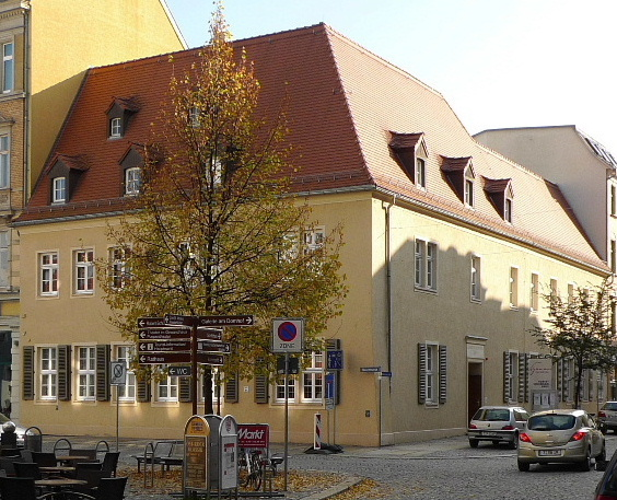 Robert-Schumann-Haus Zwickau